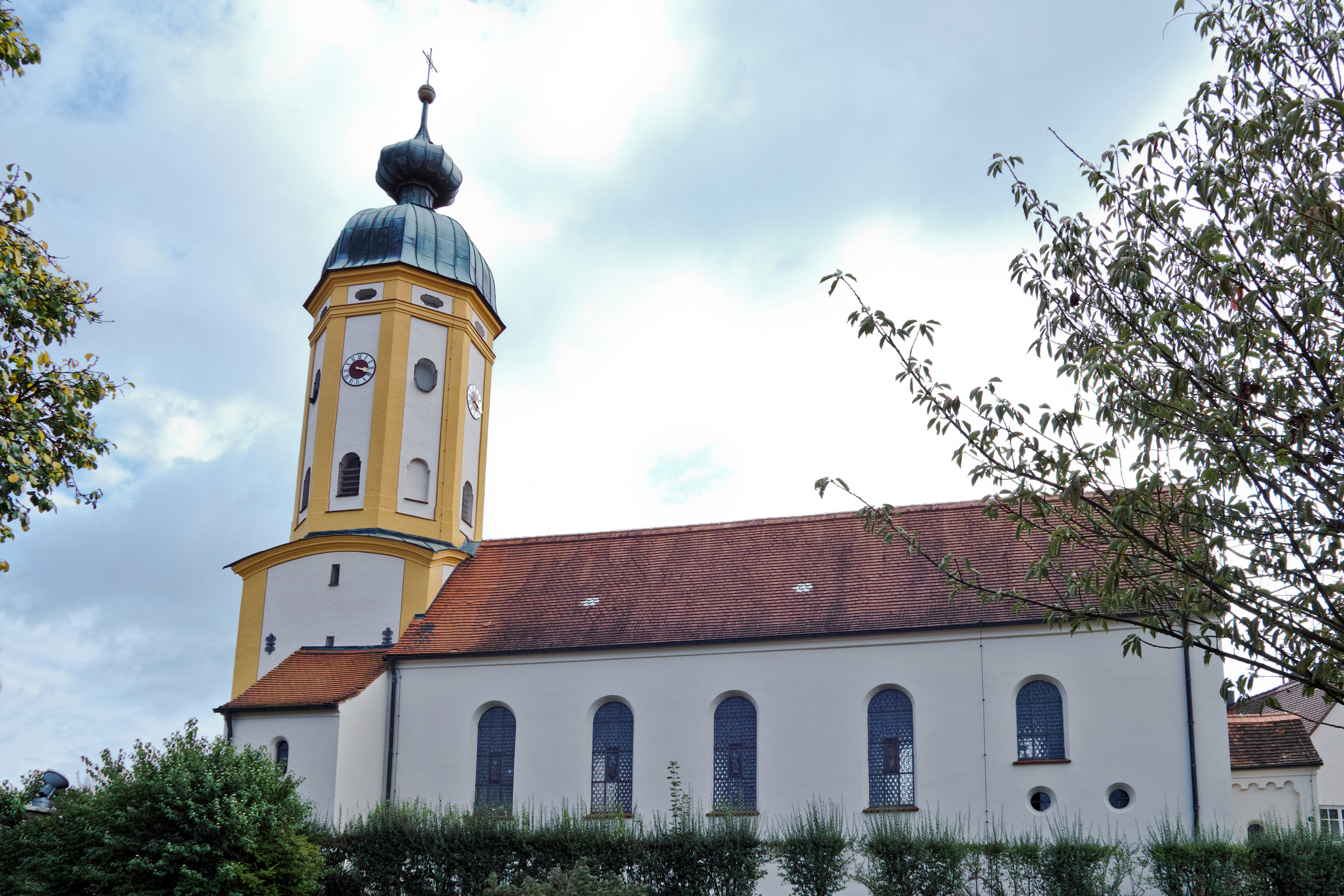 Turm der Pfarrkirche St. Andreas, Biburg, Gemeinde Diedorf.